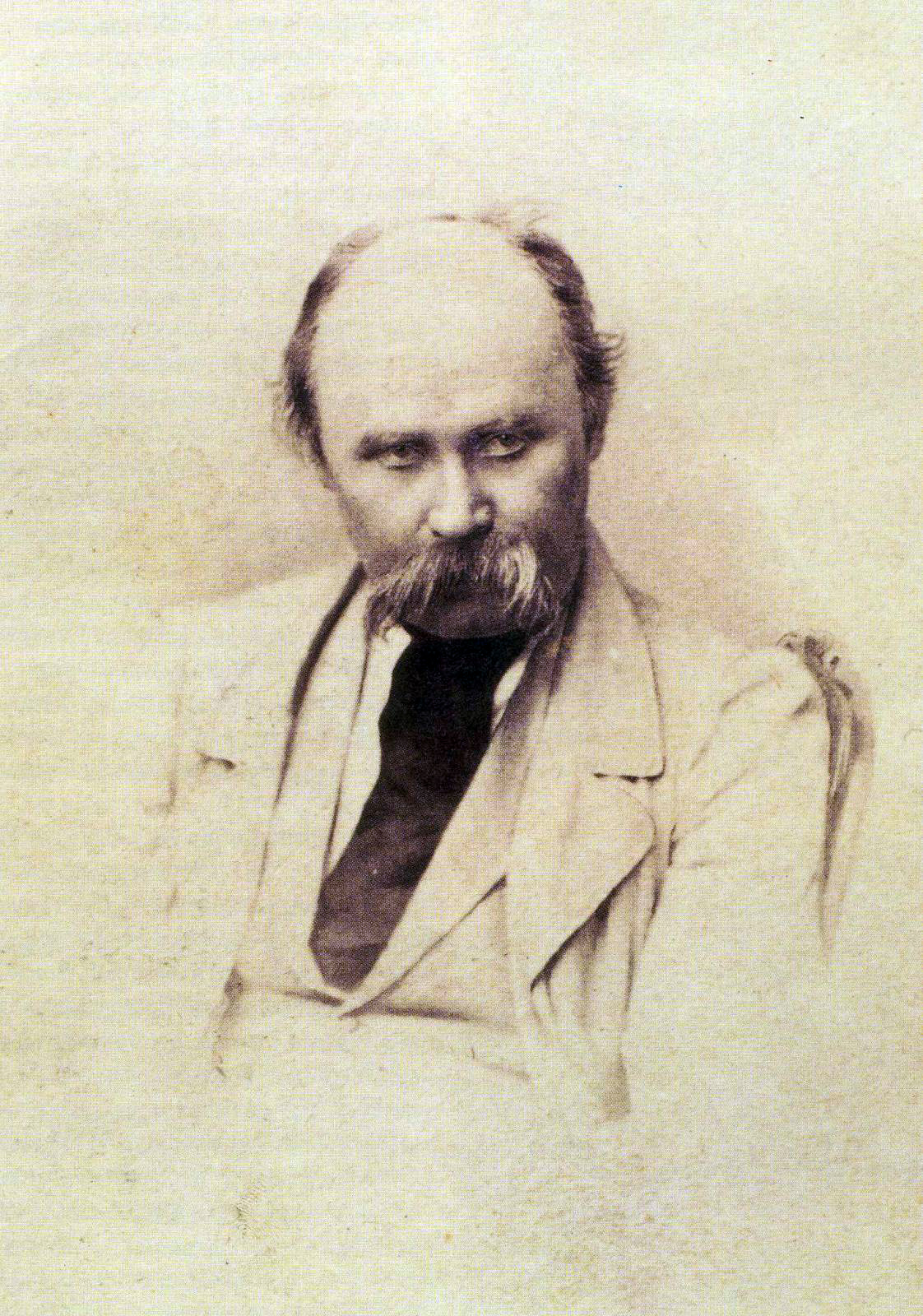 Тарас Шевченко. Фотограф невідомий. 1860. Рідкісний фотопортрет невеликого (візитного) формату. За цією фотографією Шевченко виконав офортний автопортрет 1860 року.